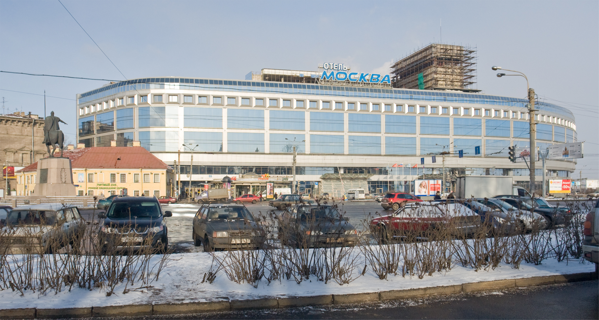 Гостиница Москва, в левой части здания — вход в вестибюль станции метро Пл. Александра Невского 1. (Санкт-Петербург) Saint Petersburg. Alexander Nevsky square, entrance to eponymous subway station.